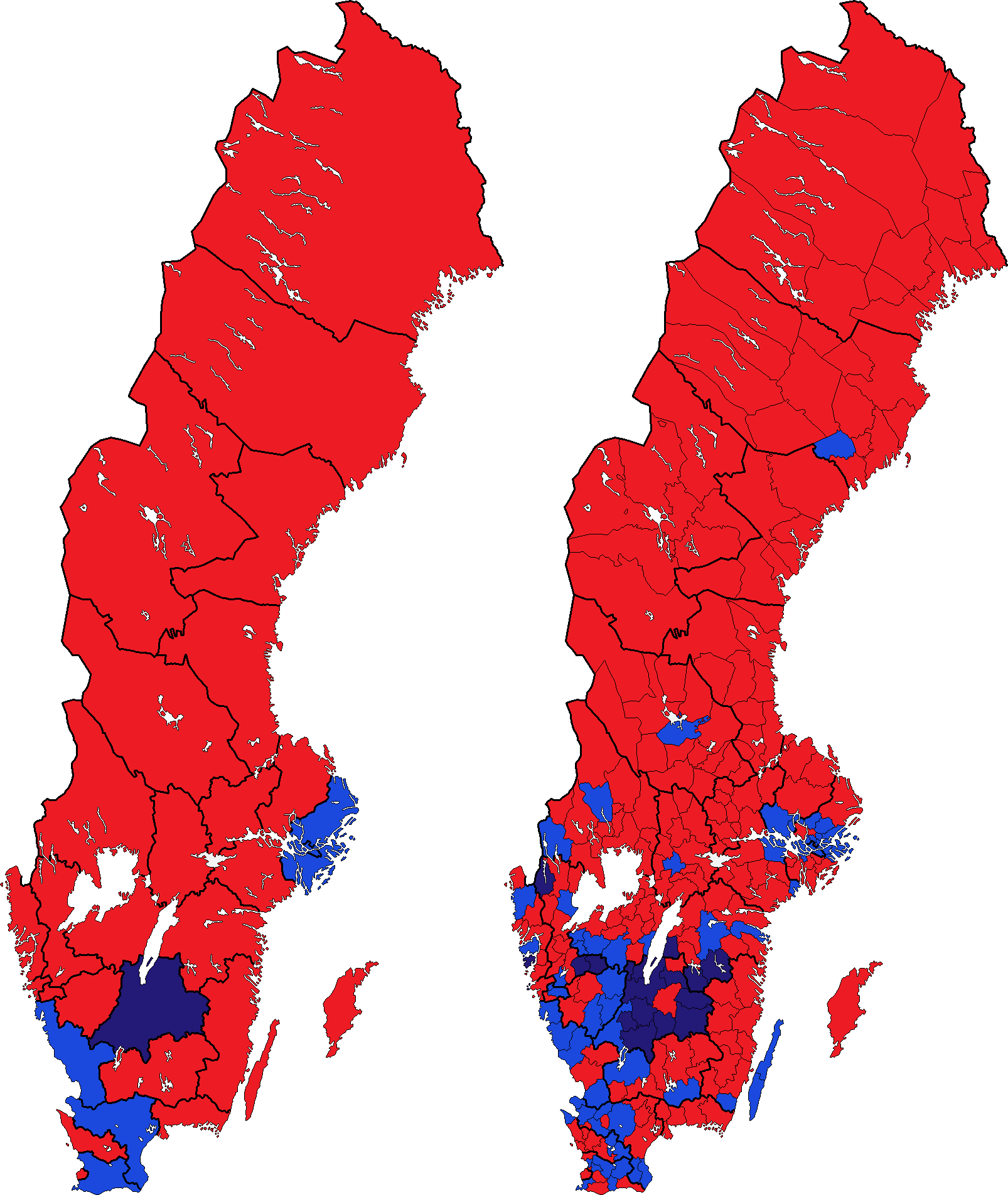 Största parti inom det ledande blocket i samtliga valkretsar och kommuner i riksdagsvalet 1998. Moderata samlingspartiet, Folkpartiet liberalerna, Centerpartiet och Kristdemokraterna har räknats till det borgerliga blocket medan Arbetarpartiet-Socialdemokraterna, Vänsterpartiet och Miljöpartiet har räknats till det socialistiska blocket. Partier därutöver räknas som egna block. Socialdemokraterna Moderaterna Kristdemokraterna